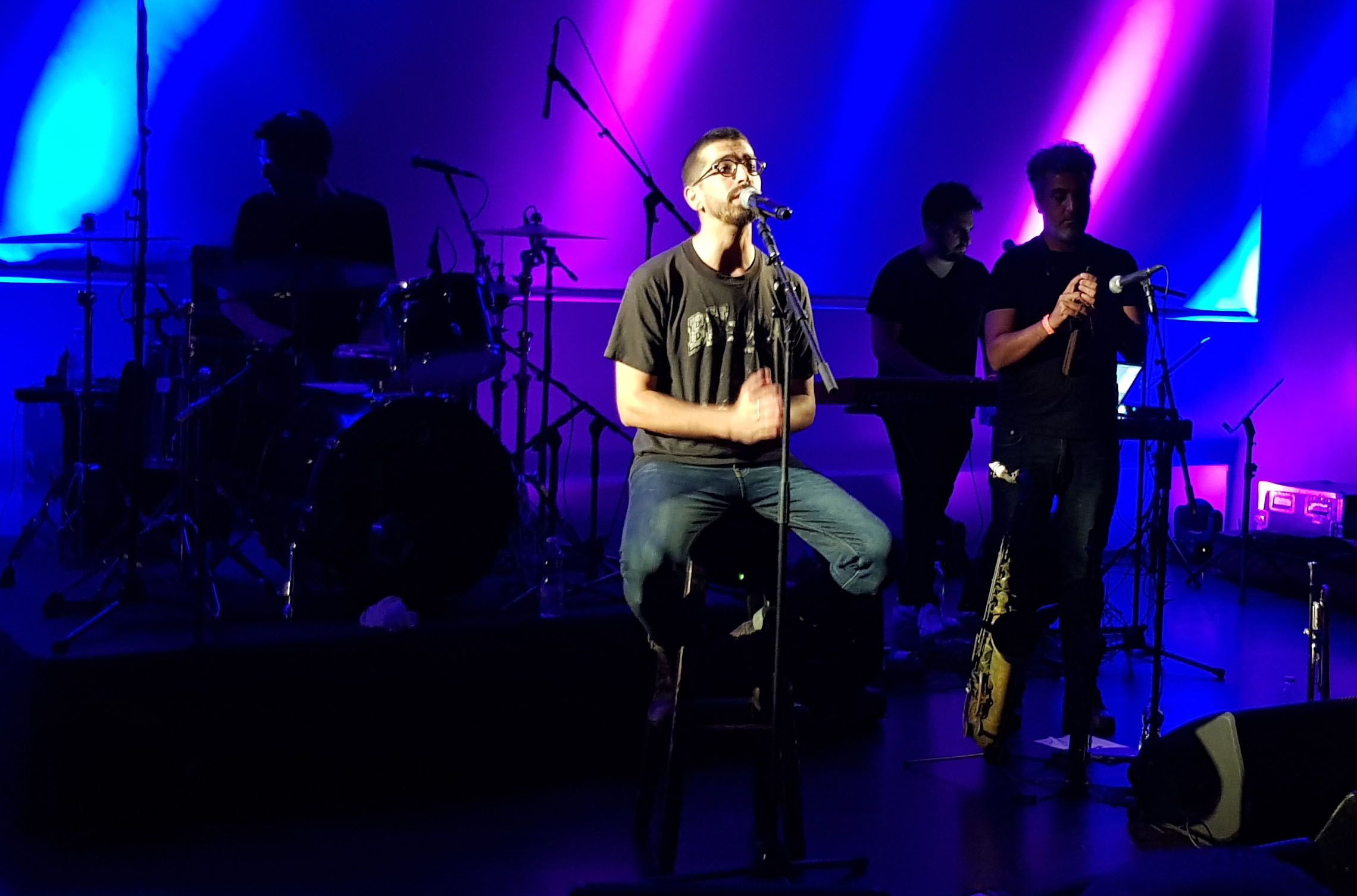 חנן בן-ארי בהופעה, אוקטובר 2019